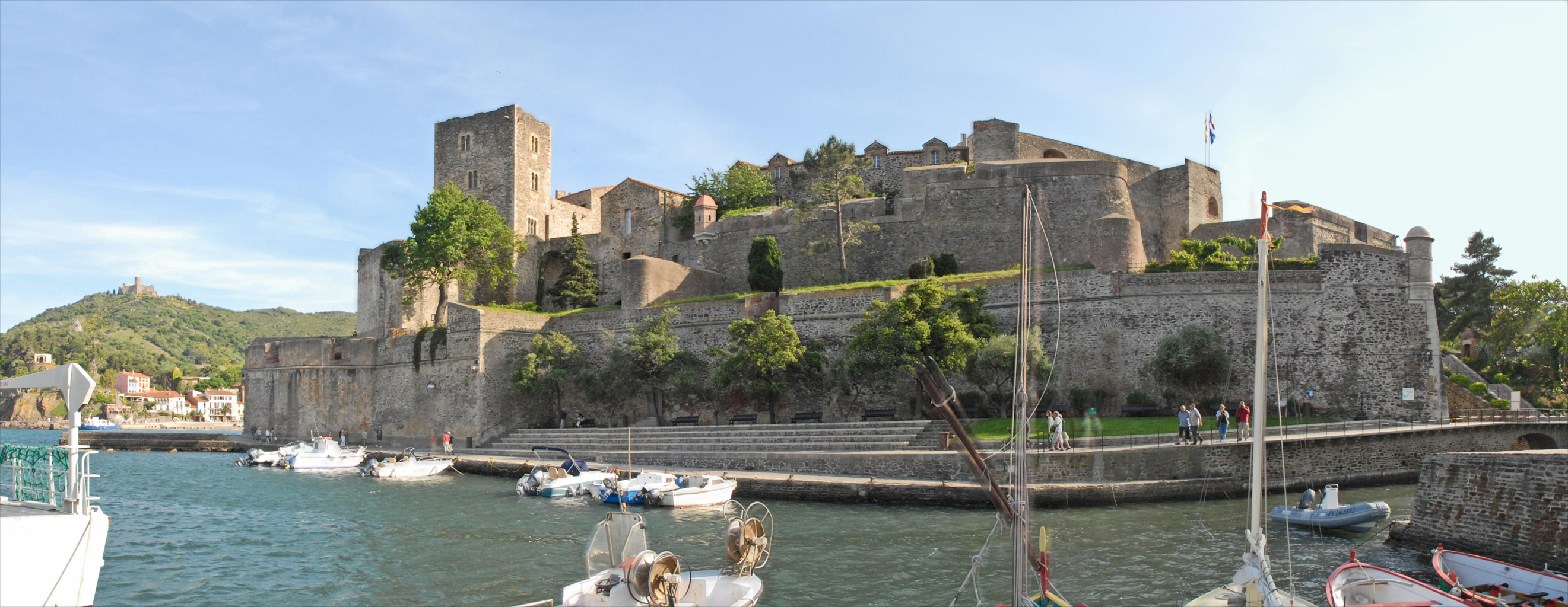 Autrefois point stratégique de la côte catalane, Collioure possède un réseau important de fortifications. Pièce maîtresse du dispositif défensif, le château royal fut élevé sur un site de construction romaine. Essentiellement aménagé par les Comtes du Roussillon et les Rois d’Aragon entre 1276 et 1344, il accueillera la cour des Rois de Majorque. La forteresse sera ensuite occupée par les Espagnols jusqu’en 1642, date où elle retombera aux mains des français. Vauban fera alors élever l’enceinte extérieure..(extrait du site officiel de la ville).. Le port de Collioure est situé dans un crique abritée des vents, ce qui en fait un des plus beaux sites de la côte méditerranéenne française.